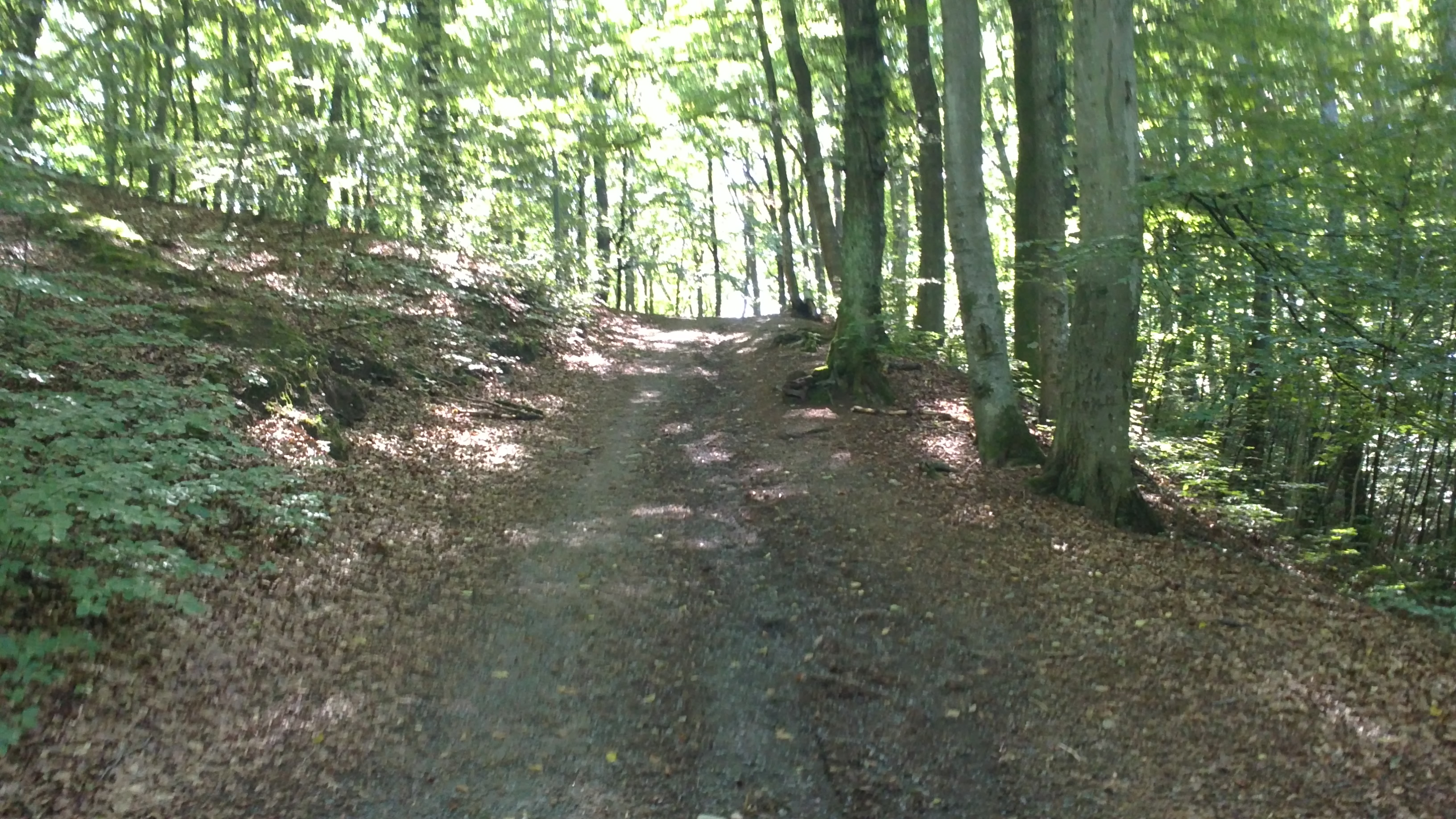 Bilde av Myrabakken